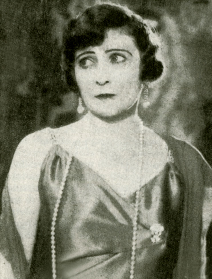 photo from La parola ripudiata (1930)